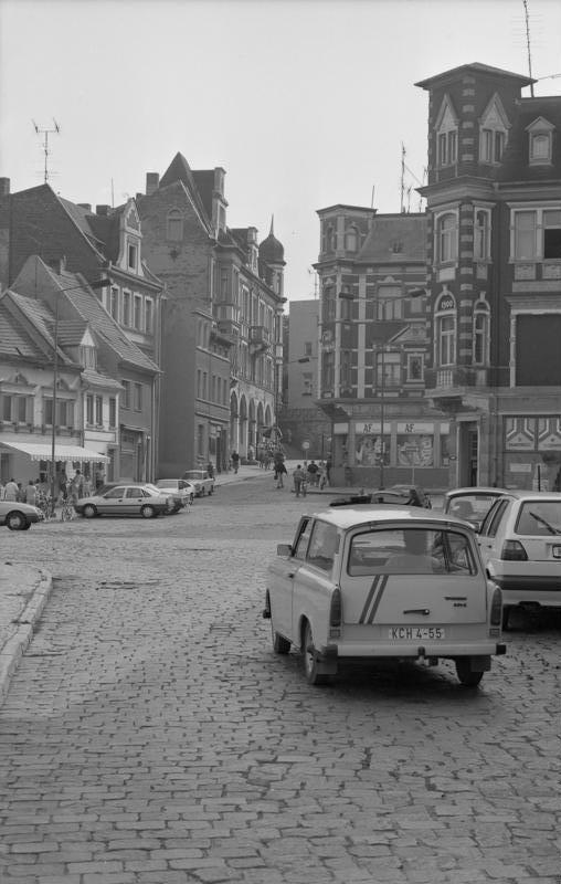 11.-18.8.1991 Bundesland Sachsen-Anhalt Bernburg/Saale